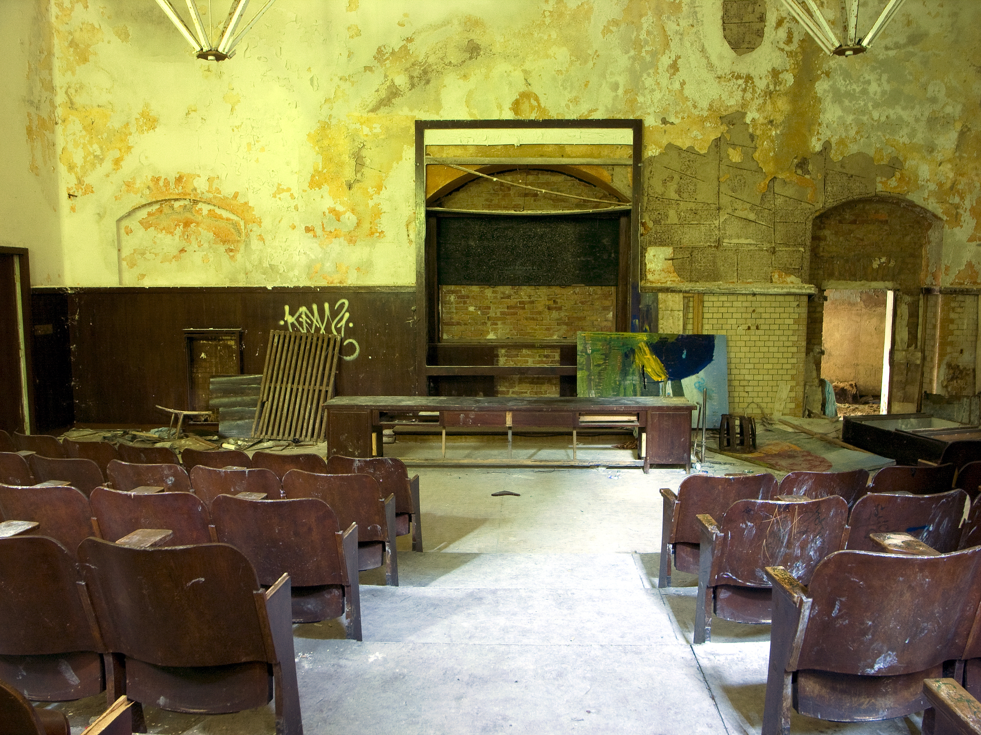 Die zwischen 1898 und 1930 von der Landesversicherungsanstalt Berlin errichteten Arbeiter-Lungenheilstätten Beelitz-Heilstätten bilden einen der größten Krankenhauskomplexe im Berliner Umland. Es ist ein denkmalgeschütztes Ensemble von 60 Gebäuden auf einer Gesamtfläche von ca. 200 ha. The Beelitz hospital complex is an ensemble of listed buildings, built from 1898 to 1930. After WW II the Russian Army in East-Germany used it as military hospital. Since 1994 it is vacant, only a few out of over 60 buildings being used. Recently vandalism is becoming an issue .